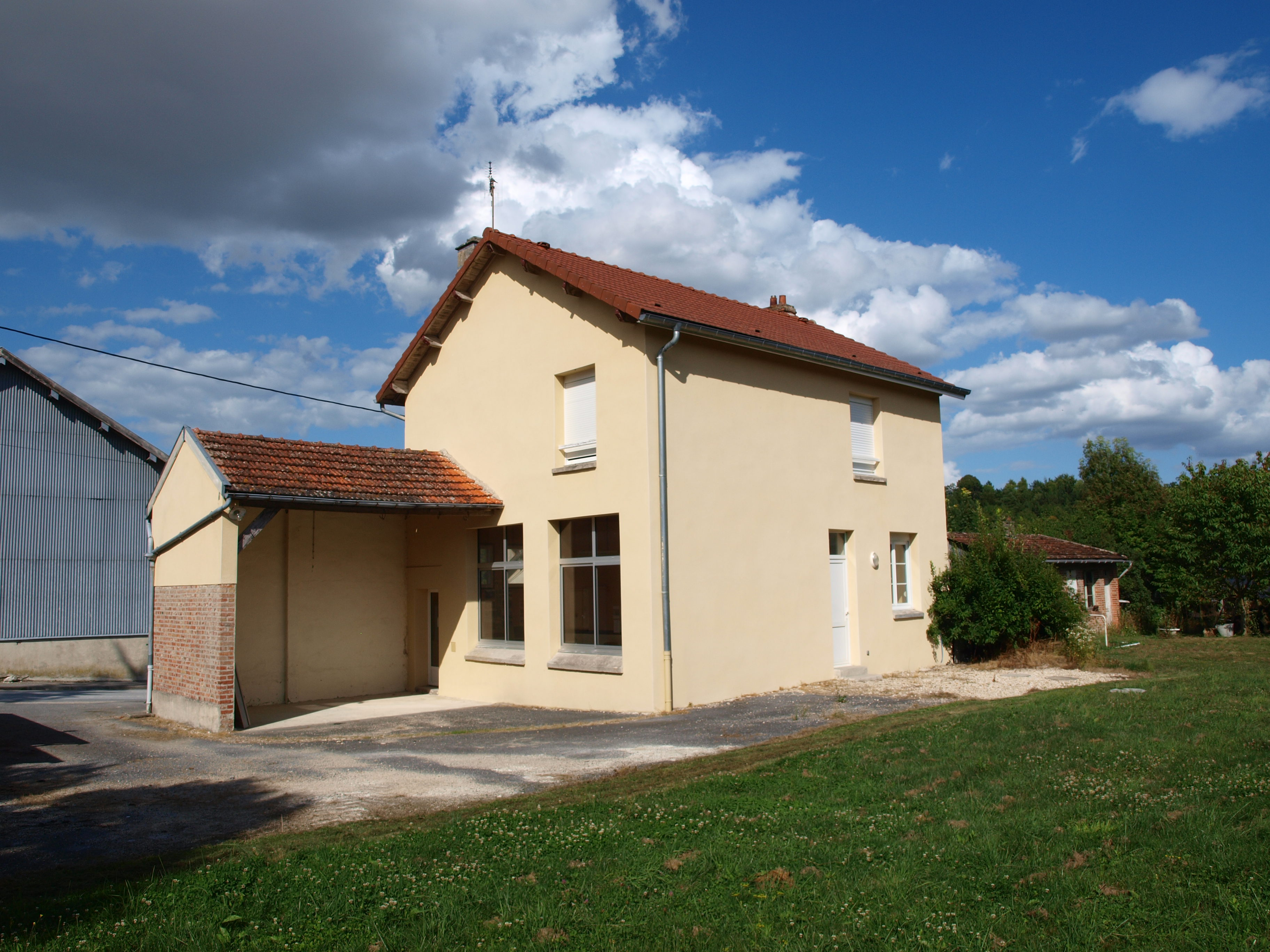 Aure (Ardennes, France) ; mairie.